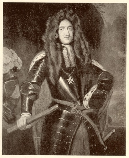 Reichsfürst Georg Friedrich zu Waldeck Graf zu Pyrmont und Cuylenburg etc.